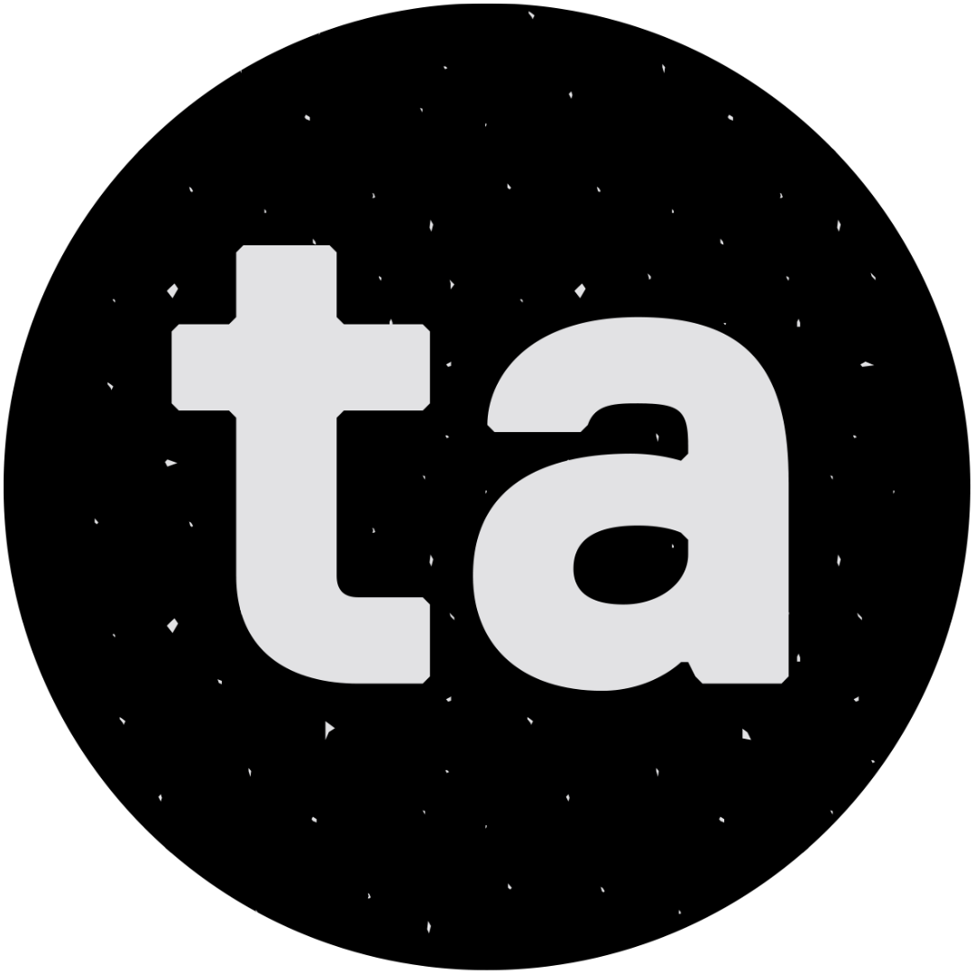 Logo Tataki